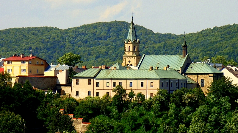 Franziskanerkloster mit seiner Kirche an der südlichen Ecke vom Marktplatz zu Sanok